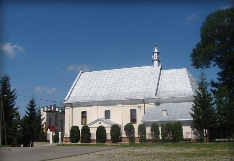 Sylwetka świątyni